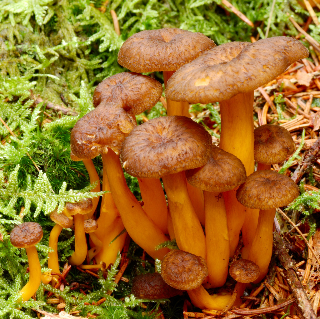 Craterellus lutescens syn. Cantharellus aurora